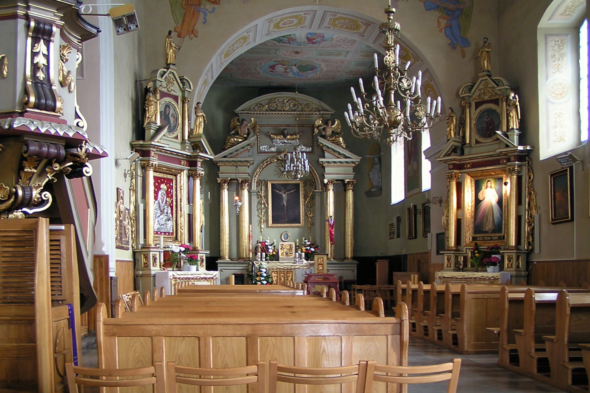 Wnętrze kościoła parafialnego w Kazimierzy Wielkiej